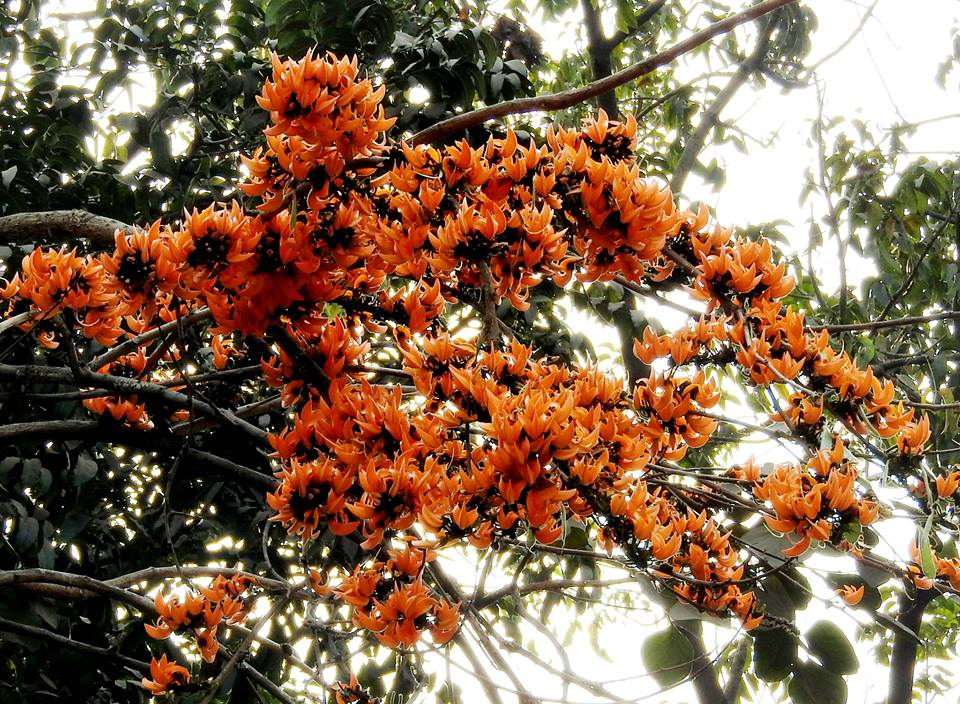 পলাশ ফুল